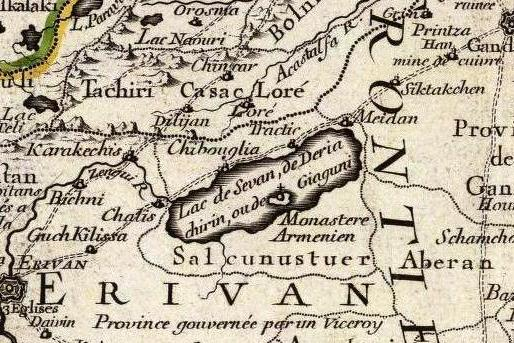 Carte des Pays voisins de la Mer Caspiene, dressee pour l'usage du Roy. Sur la carte de cete Mer, faite par l'ordre du Czar, sur les Memoires manuscrits de Soskam-Sabbas, Prince de Georgie, sur ceux de Mrs. Crusius, Zurabek, et Fabritius Ambassadeurs a la Cour de Perse, et sur les eclaircissemens tirez d'un grand nombre de persones intelligentes du pais. Assujetie aux observations astronomiques. Par Guillaume Delisle, Premier Geographe du Roy, de l'Academie Royale des Sciences. 15 Aout 1723. Marin sculpsit. A Paris, chez le Sr. Delisle, Quay de l'Horloge.